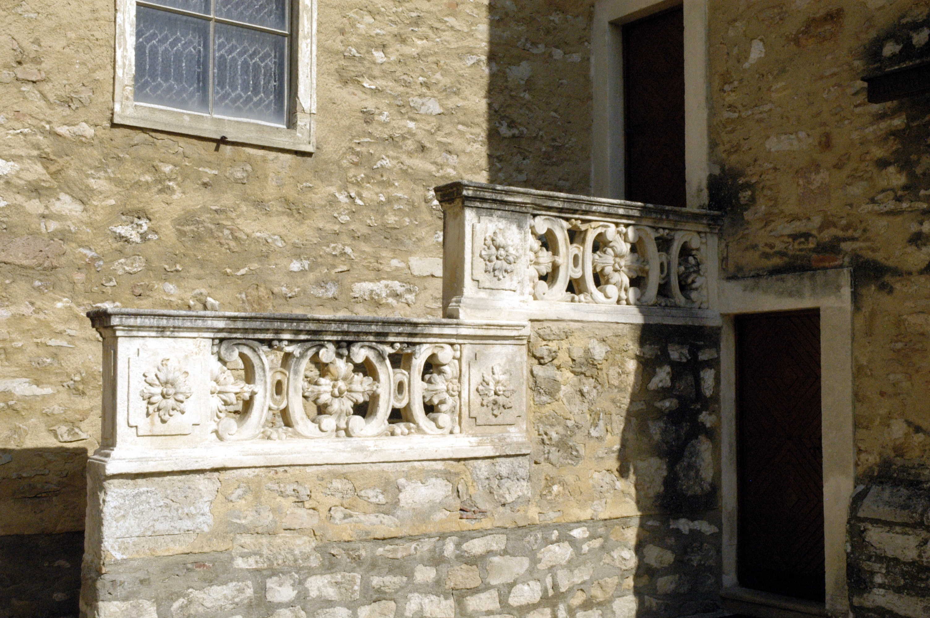 katholische Pfarrkirche heilige Katharina in Immendorf, Gemeinde Wullersdorf (Detail)